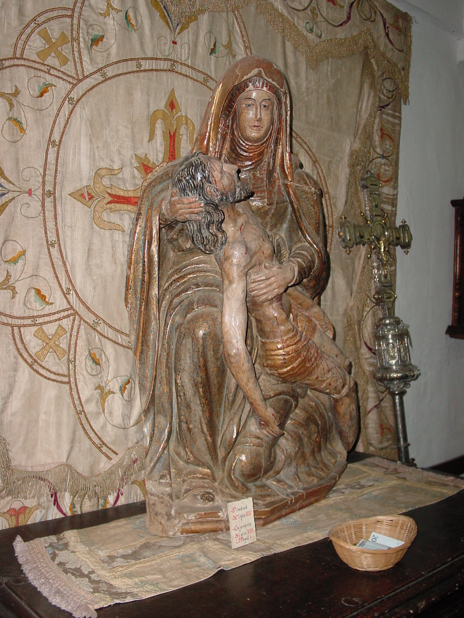 Iglesia de San Claudio en Valderas (León, España). Piedad de principios del siglo XV.